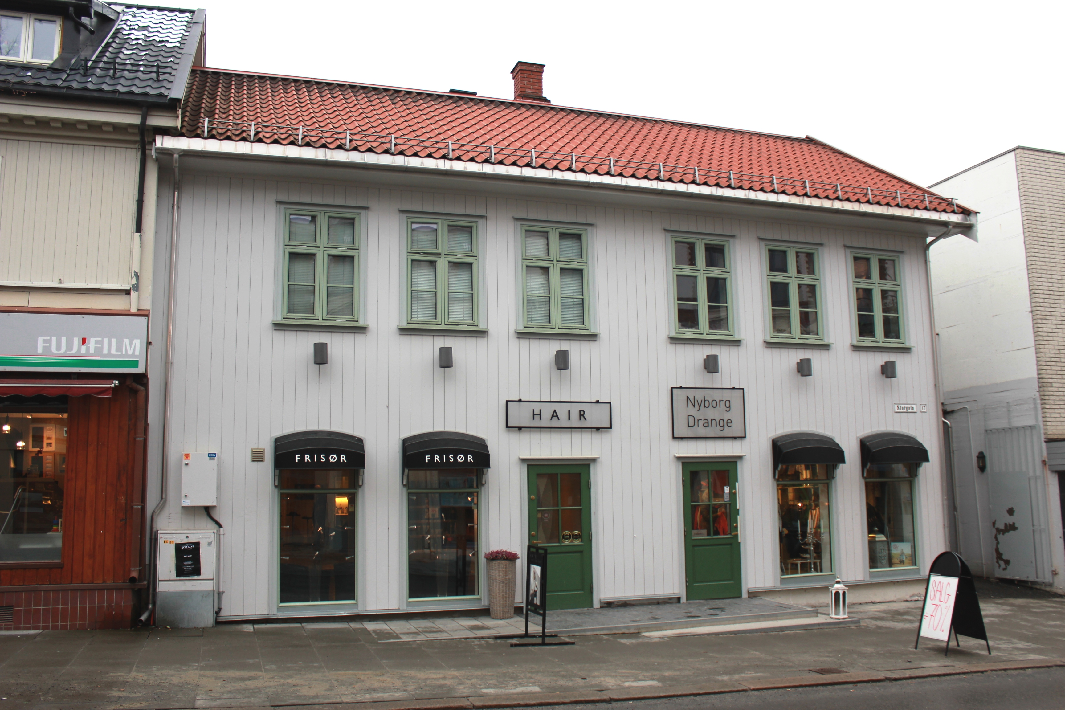 Storgata 17 på Gjøvik.